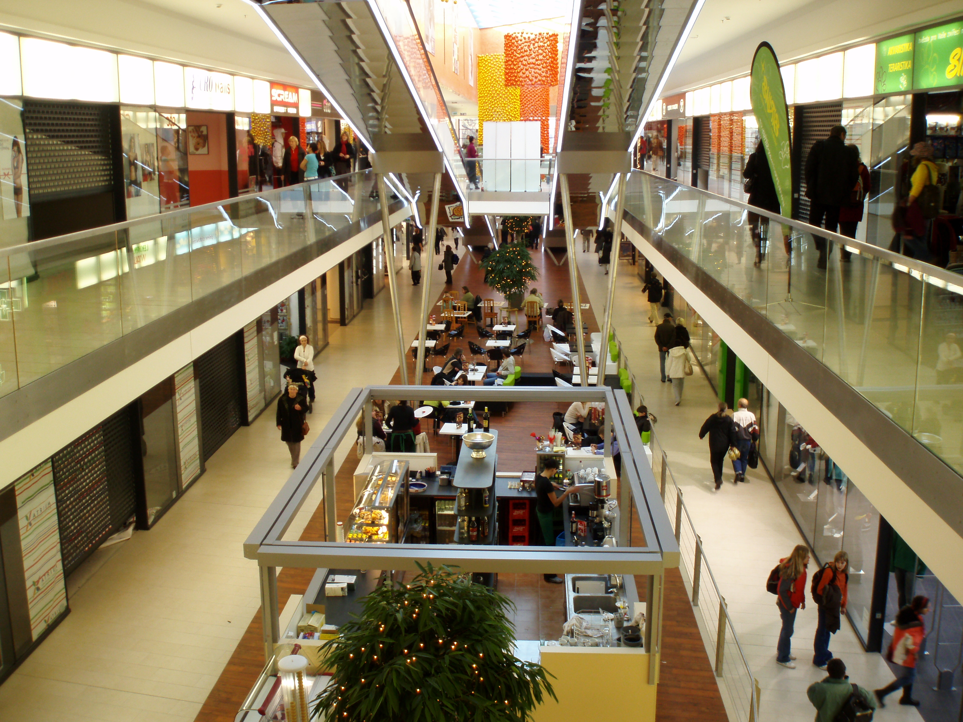 Obchodní centrum Atrium (Hradec Králové)